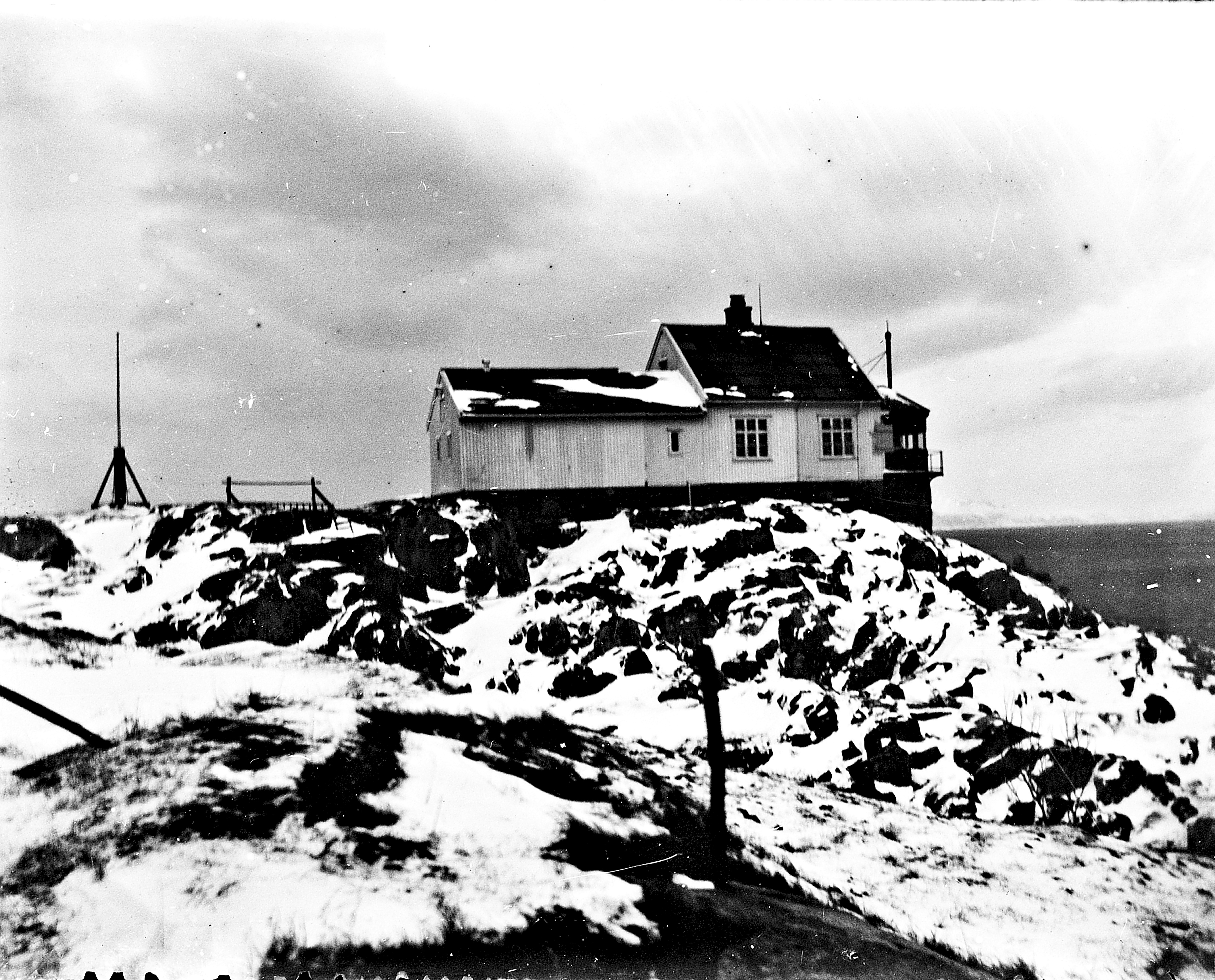 Bildet er hentet fra Arkivverket. Bjørnøy, Bodø Arkivinstitusjon : Riksarkivet Arkivnavn : Fyrdirektoratet Sted : Norge, Nordland, Bodø, Bjørnøy Emneord: Fyr, Kyst Avbildet